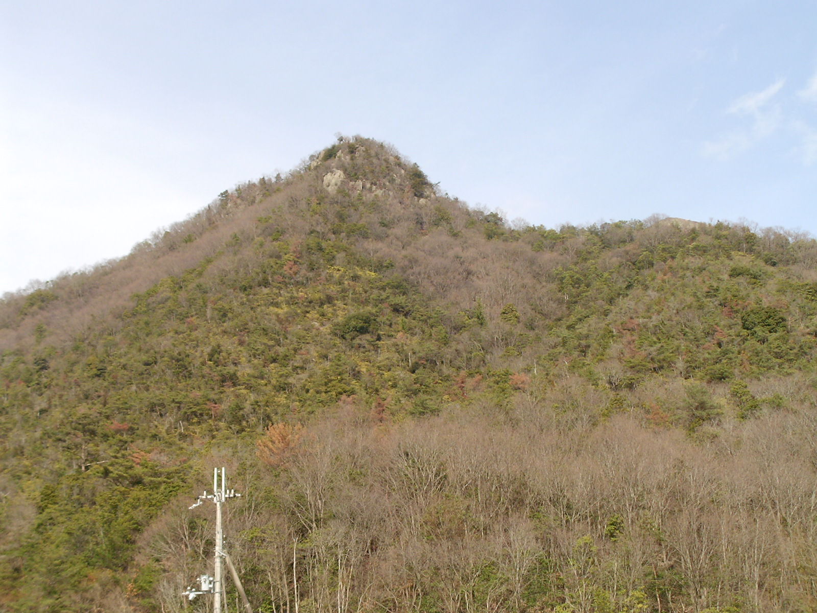 姫路市の峰相山を29号線より望む